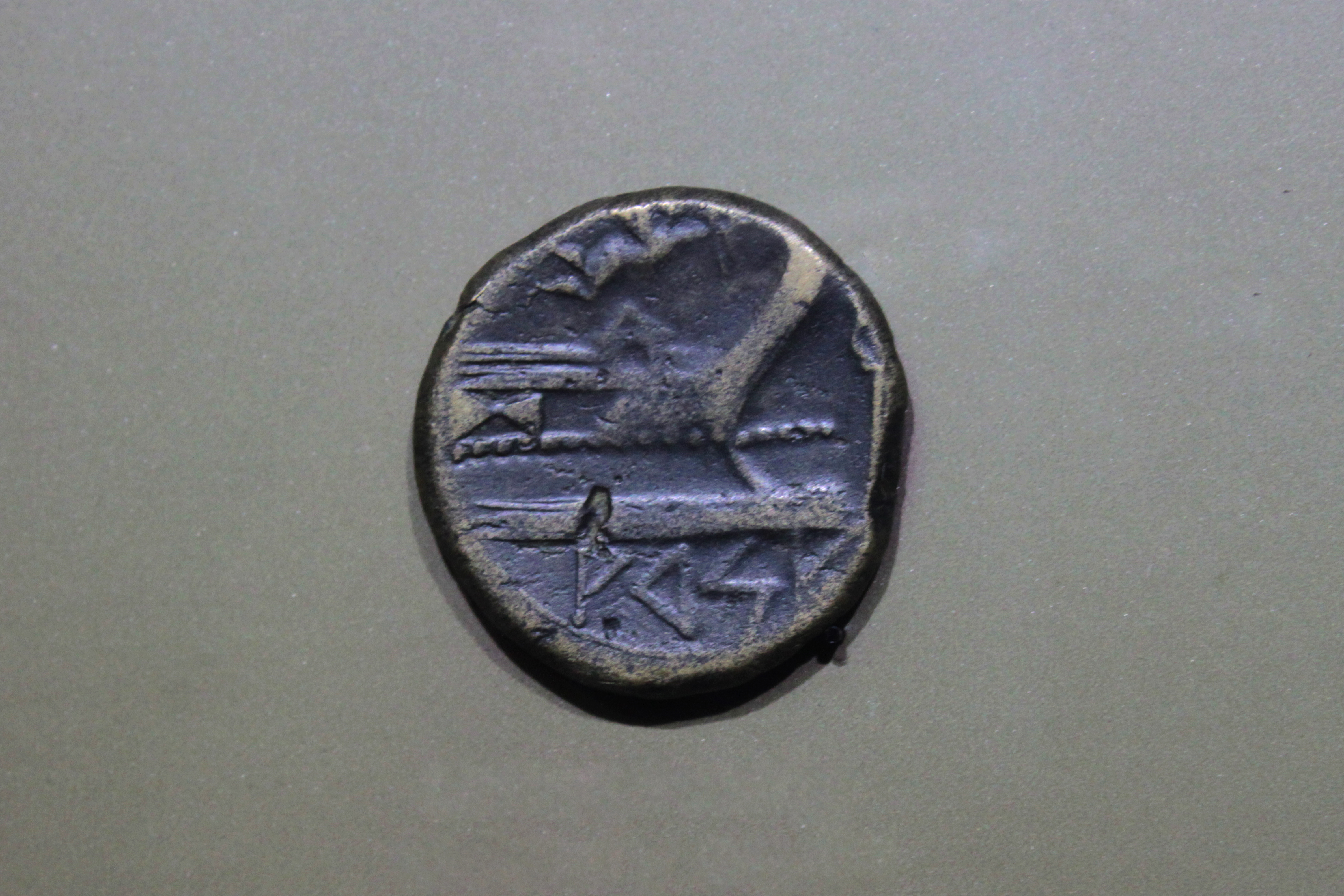 Unidad y media de Saguntum de los años 133 al 75 aC. Depositada en el Museo de Prehistoria de Valencia, Comunidad valenciana, España.